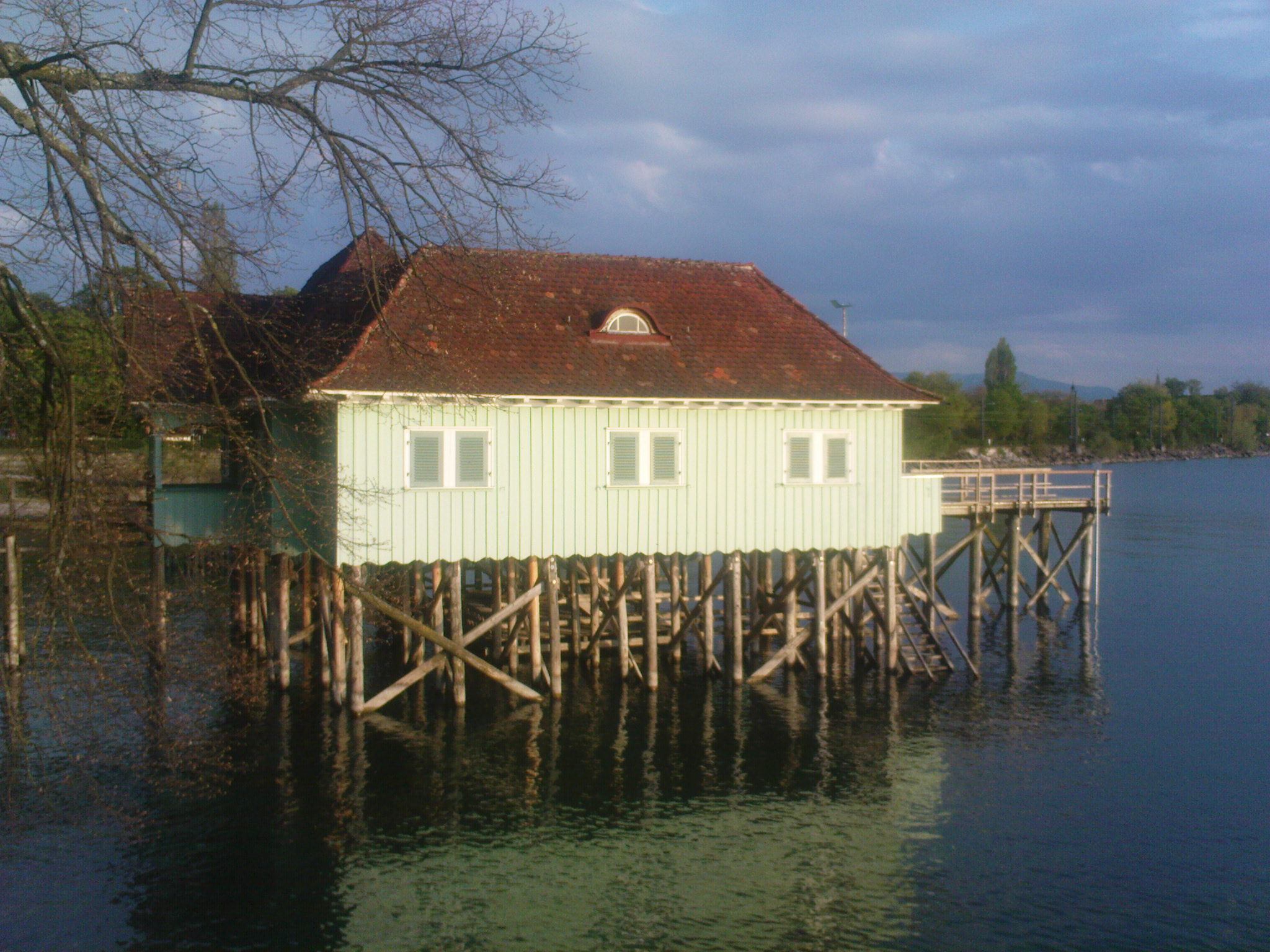 Aeschacher Bad, Lotzbeckweg 3